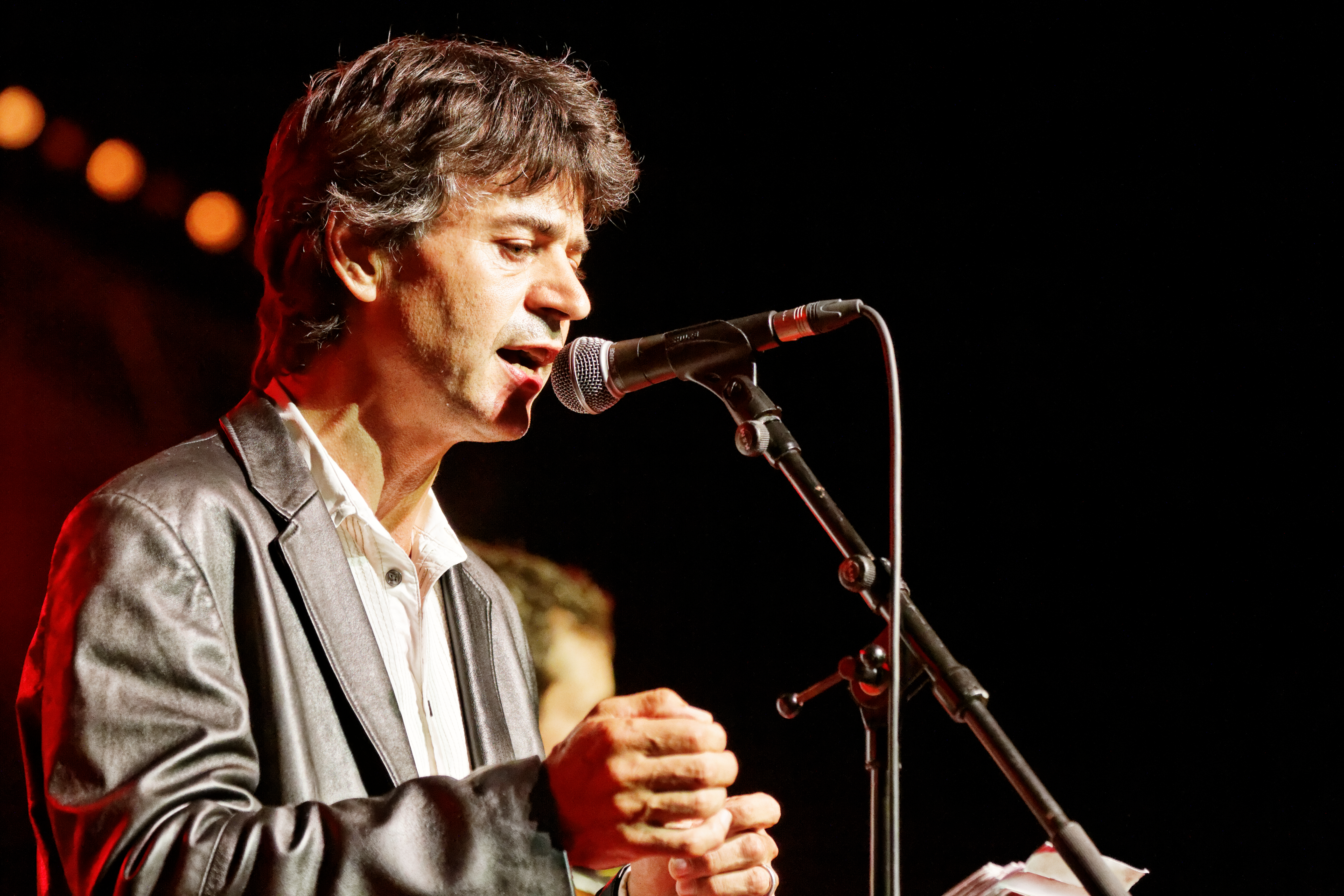 Denez Prigent en concert sur la scène Gradlon lors du festival de Cornouaille 2014.